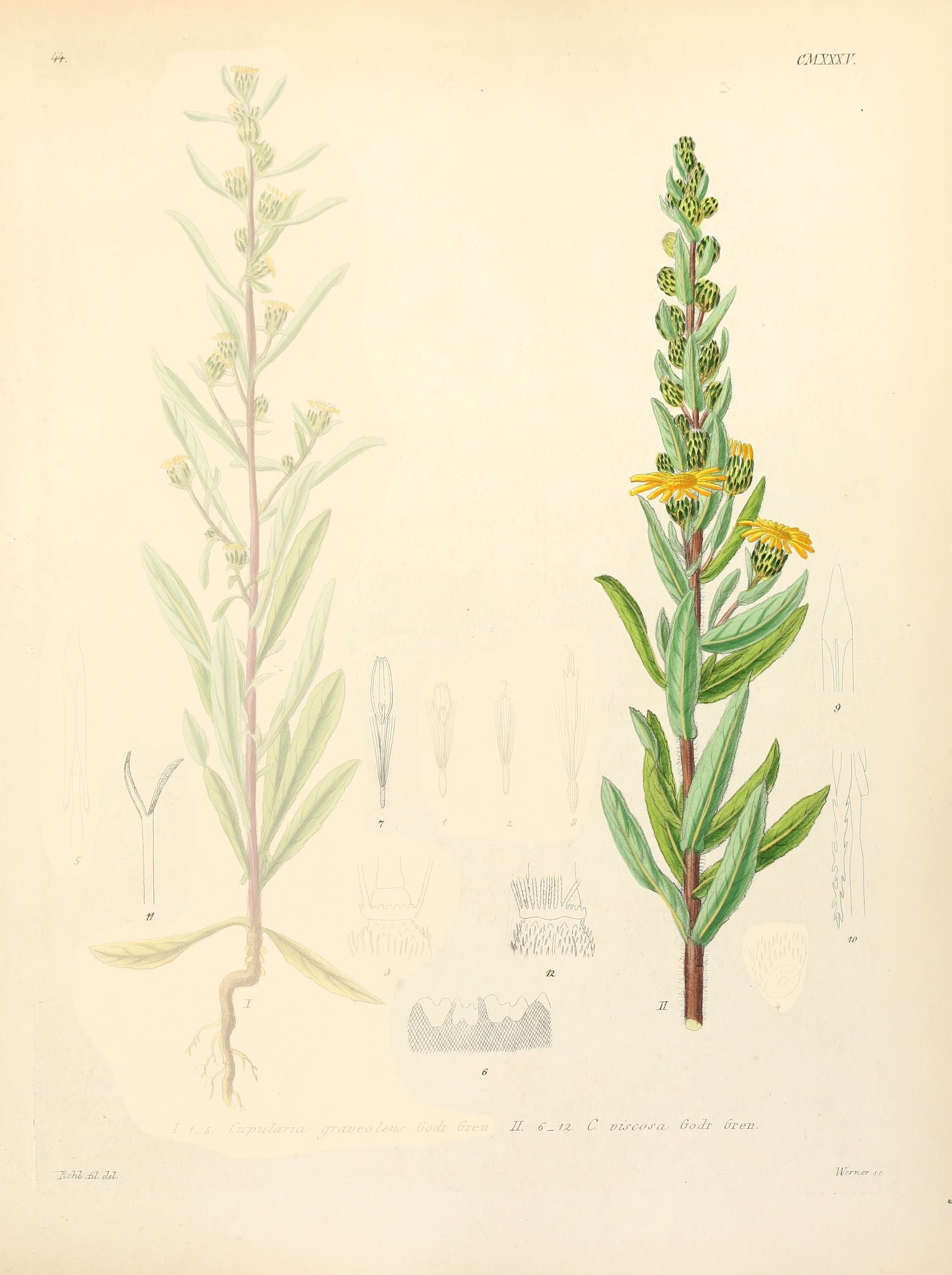 Legende: II Oberer Teil der Pflanze. 6 Körbchenboden, Ausschnitt. 7 Strahlenblüte. 8 Röhrenblüte. 9 Staubbeutelspitze. 10 Staubbeutelschwanz. 11 Griffelspitze. Frucht, oberer Teil.